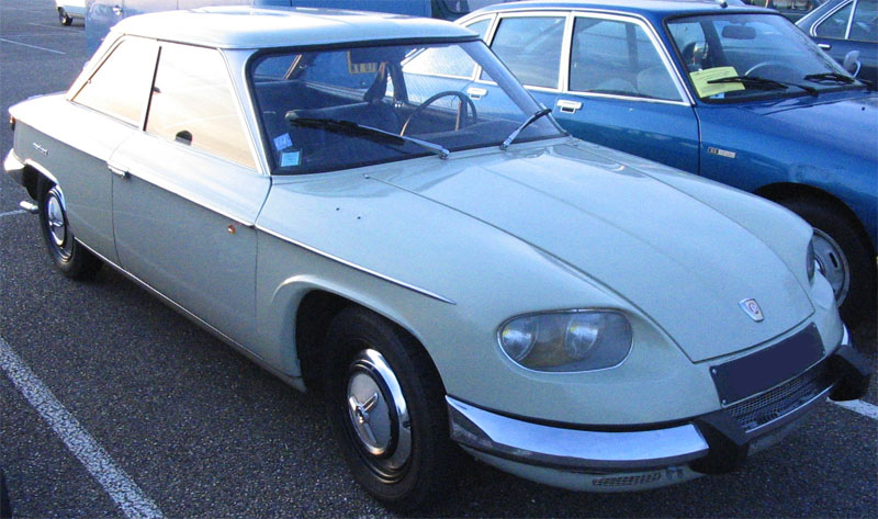 Photo personnelle d'une automobile Panhard 24 BT prise en Novembre 2006 au salon epoqu'Auto de Lyon.